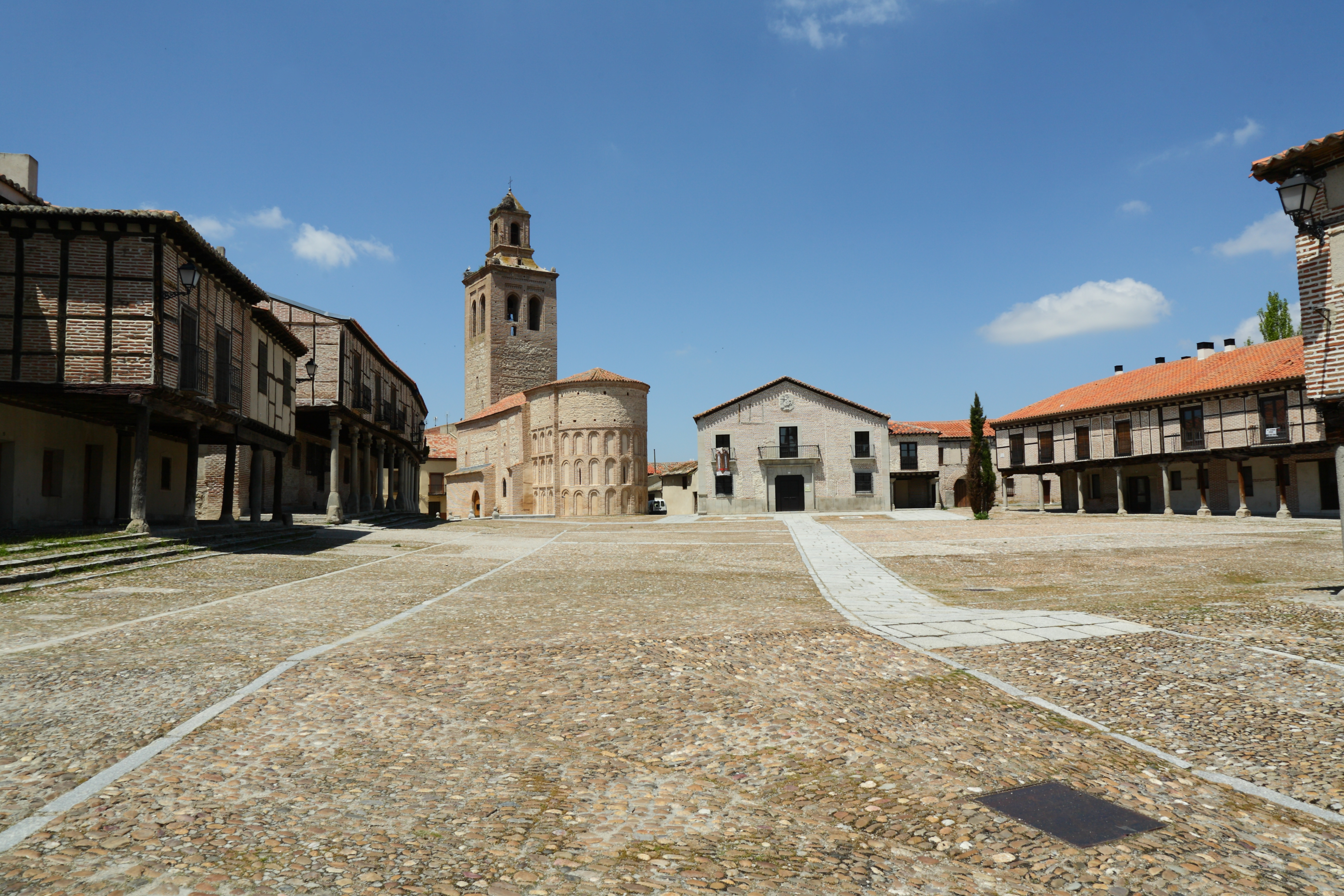 Plaza de la Villa de Arévalo.